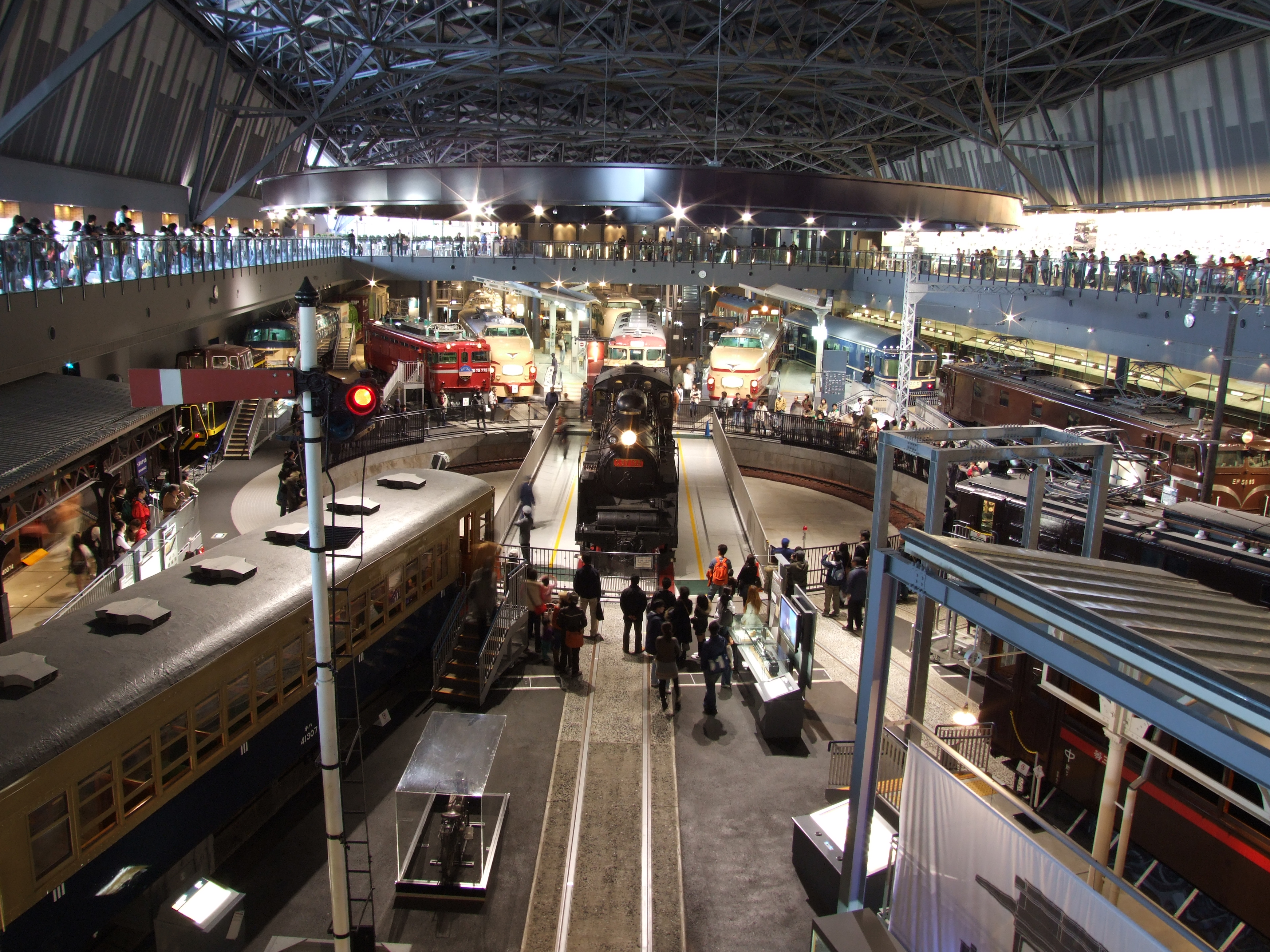 鉄道博物館ヒストリーゾーン（２階から1階を望む）